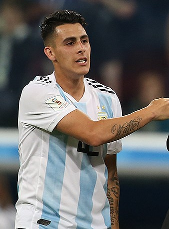 Гол Рохо в концовке выводит Аргентину в плей-офф чемпионата мира